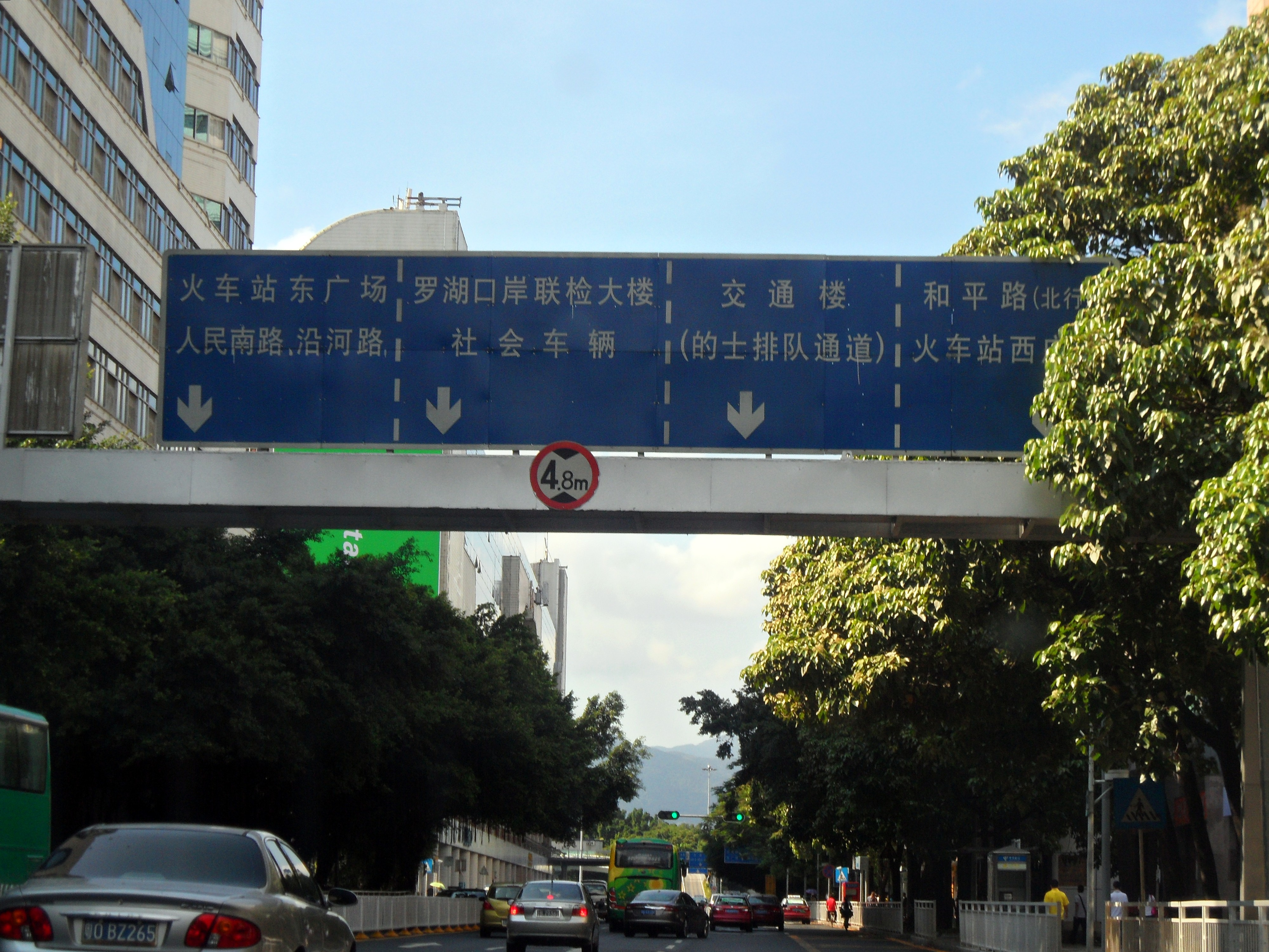 广东省深圳市街道景色